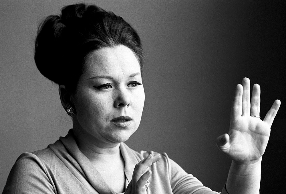 Renata Scotto in Milan